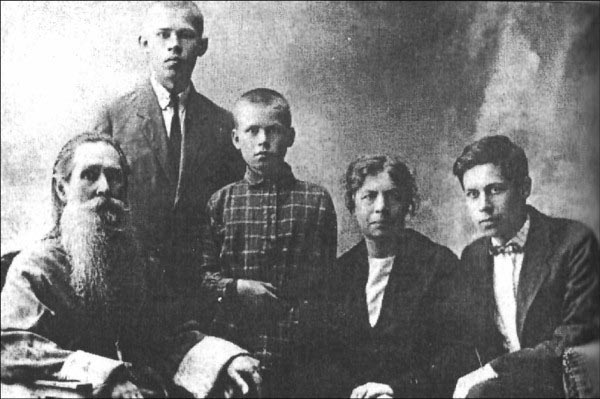 Семья Николая Михайловича Боголюбова (1872— 1934), протоиерея Русской Православной Церкви. Отец Николай, Алексей, Михаил, жена о. Николая - Ольга Николаевна, урождённая Люминарская, сын Николай.